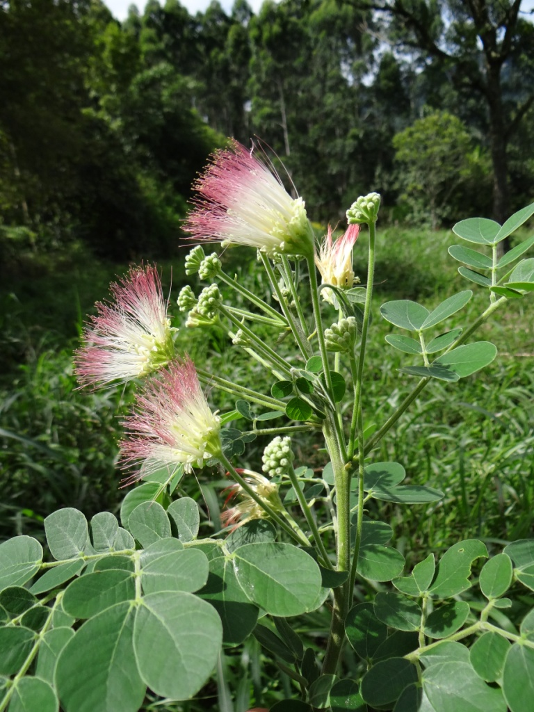 Samanea tubulosa (Benth.) Barneby & J.W.Grimes - FABACEAE - Brasília - Distrito Federal - Brasil.